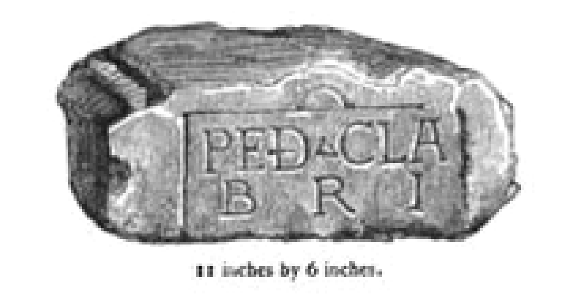 Centurialstein der Classis Britannica, gefunden bei Birdoswald (Banna),RIB 1945.